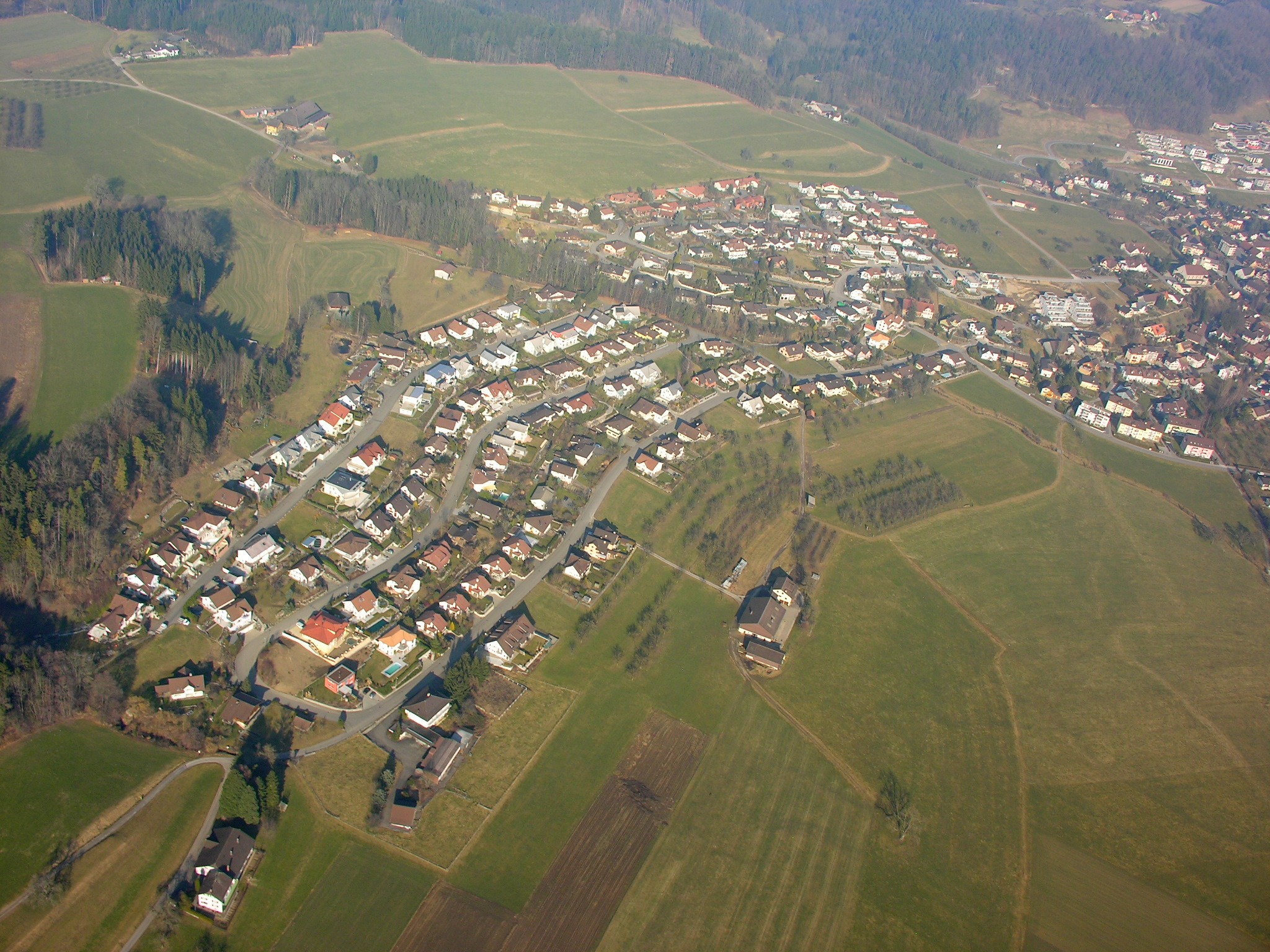 Aerial View overhead Zuzwil